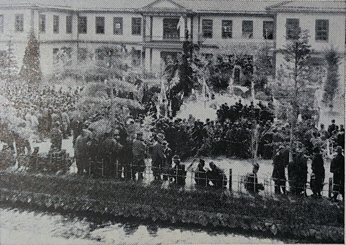 松川村立松川小学校。野々山直記頌徳碑の建立記念式典。